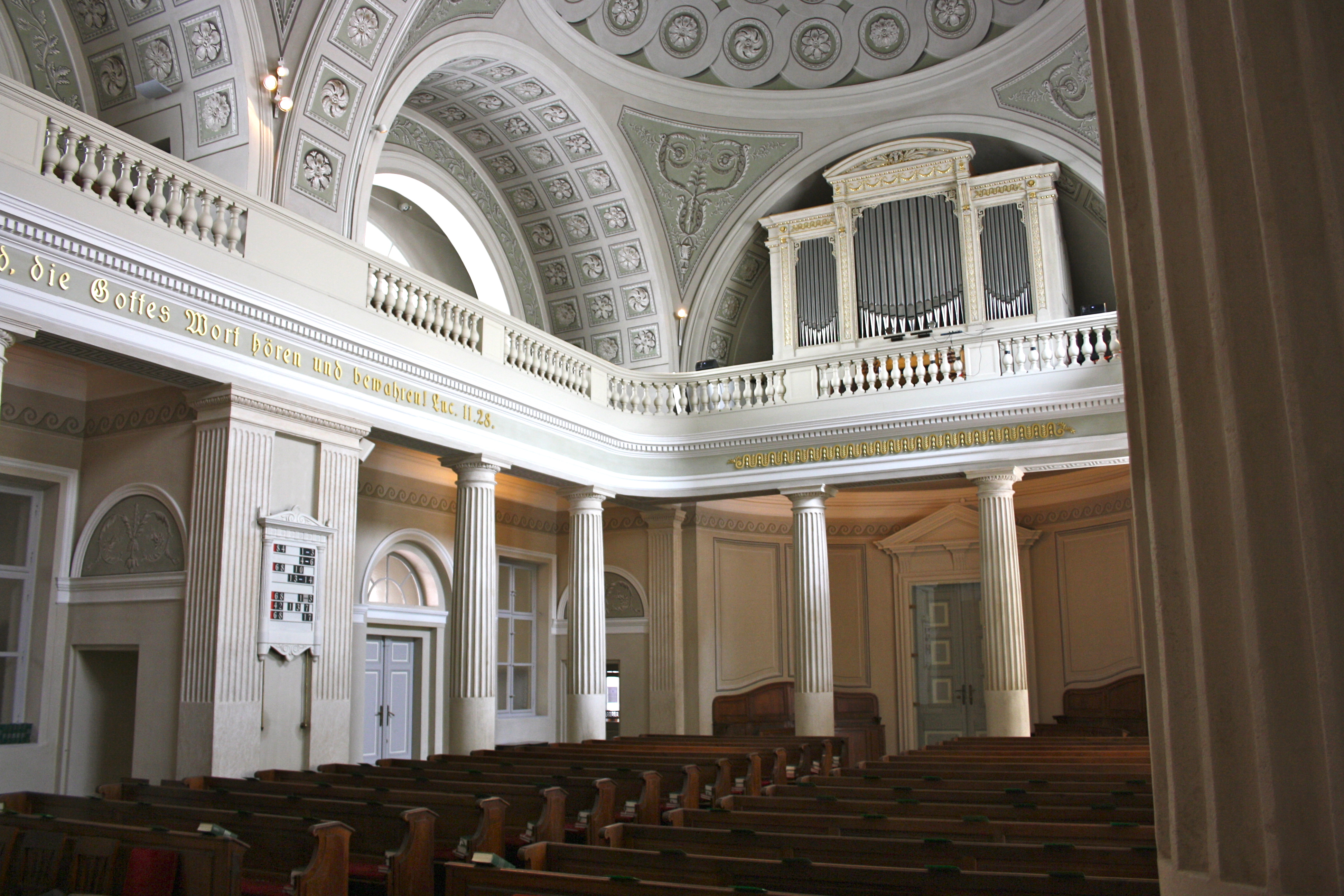 Innenraum der Reformierten Stadtkirche in Wien, Blick auf die Empore.